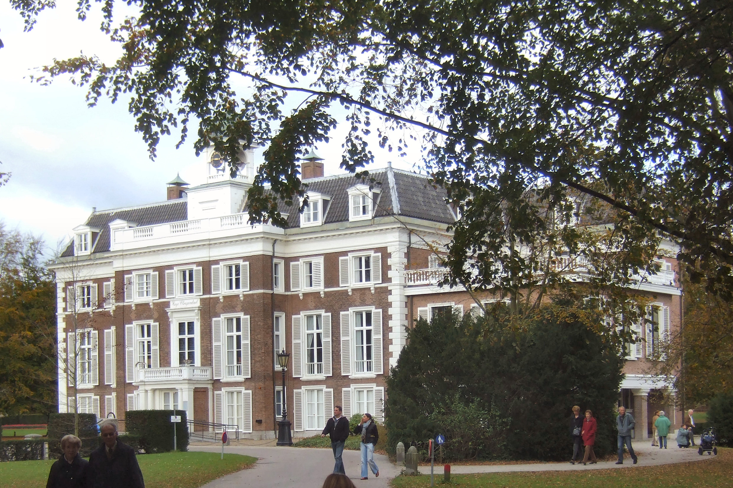 Huis Clingendael in Den Haag (The Hague)